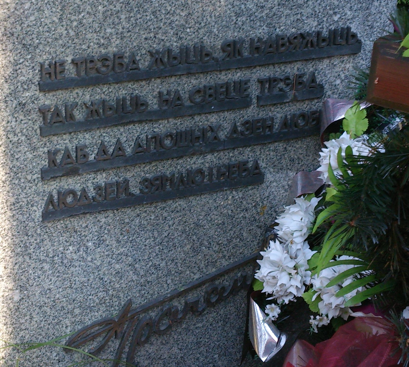 Четверостишие белорусского поэта Анатолия Гречаникова, выгравированное на надгробном памятнике поэту на Восточном кладбище г. Минска.